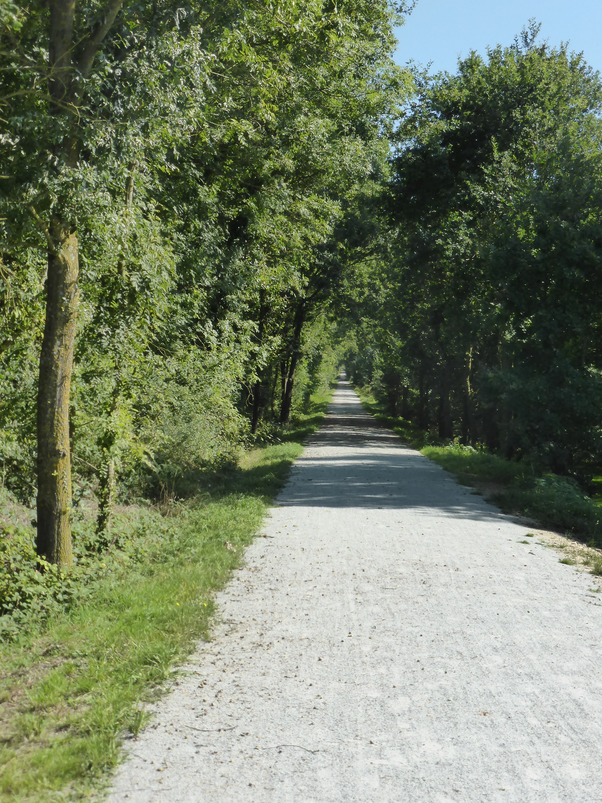 Voie verte entre Vitré et Moutiers (35)